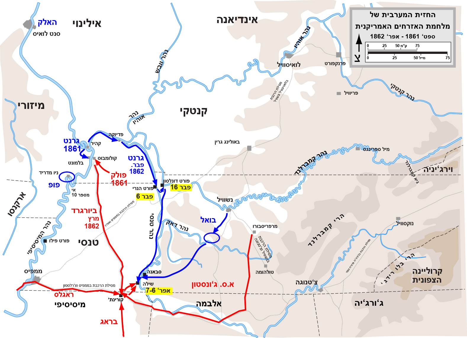 Western Theater of the American Civil War, actions from Belmont to Shiloh. Drawn by Hal Jespersen in Adobe Illustrator CS5. Graphic source file is available at